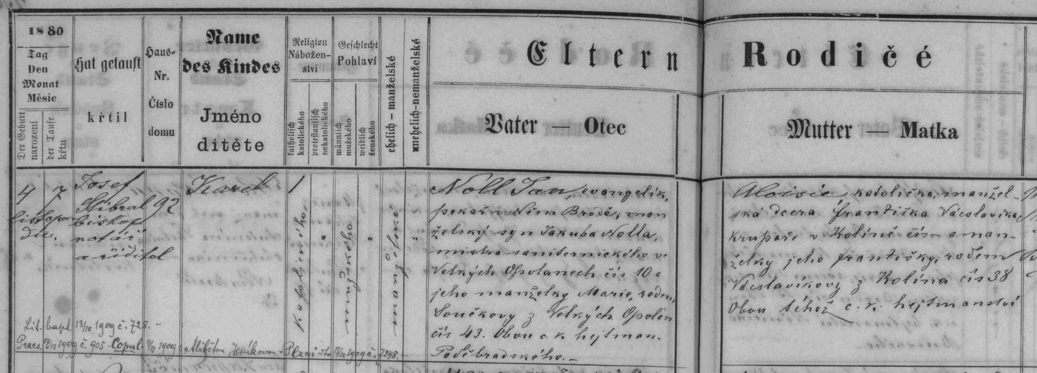 Matriční zápis o narození Karla Nolla, matrika N1867-1882 Německý (Havlíčkův) Brod